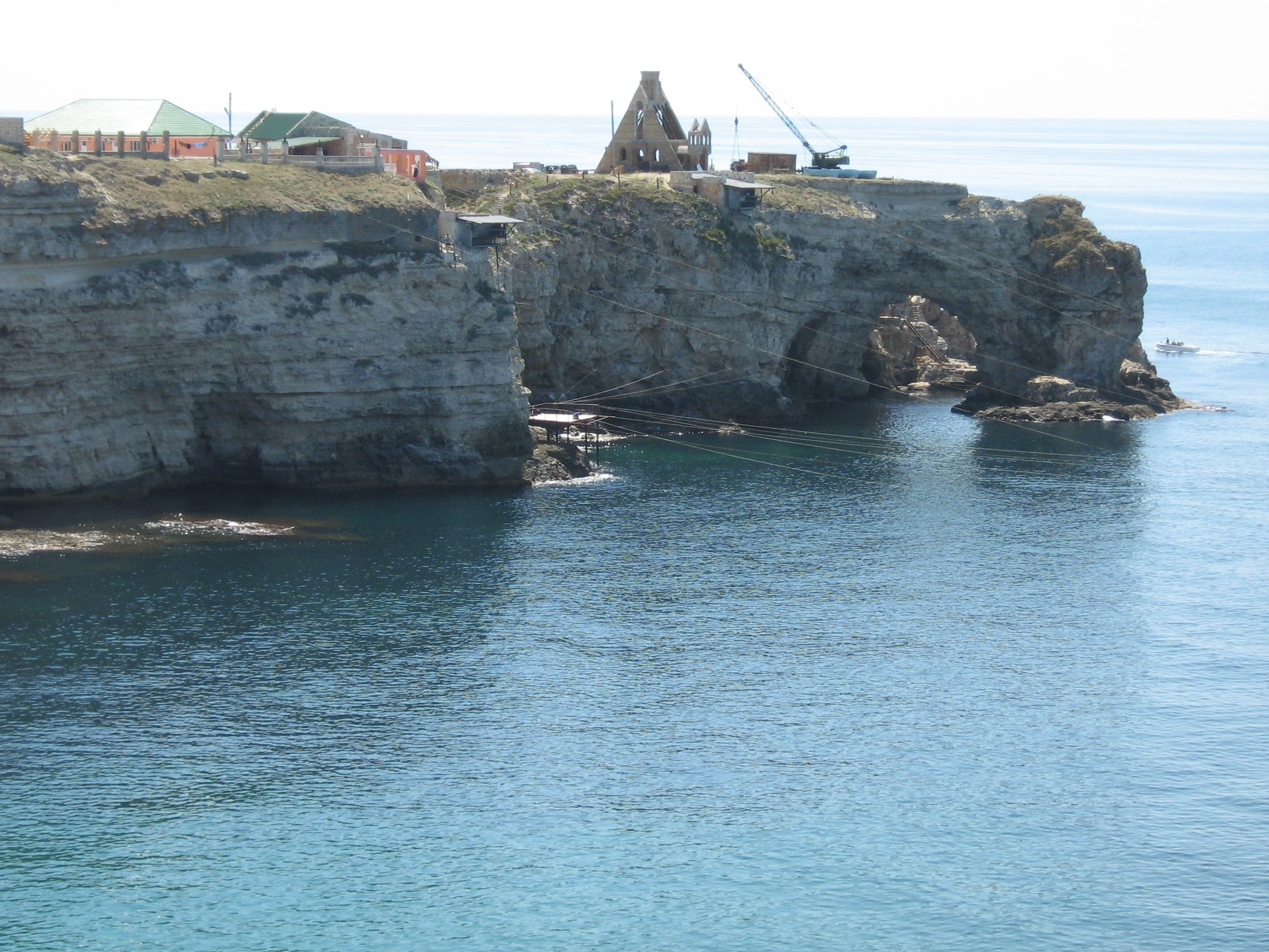 Большой Атлеш